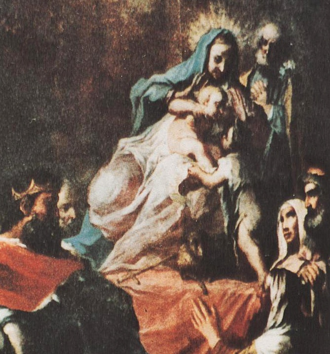 Ausschnitt aus dem Hochaltargemälde der Schlosskirche Fußgönheim, 2. Person von links ist: Jakob Tillmann von Hallberg (1681-1744), kurpfälzischer Minister und Hofkanzler, Erbauer von Schloss Fußgönheim